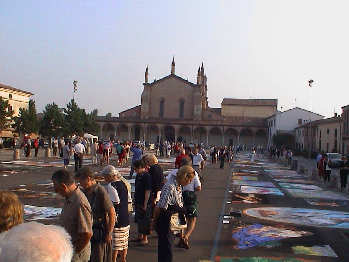 Sagrato del Santuario di S.Maria delle Grazie Curtatone(MN), lavoro personale, 2002, Pietro Liberati